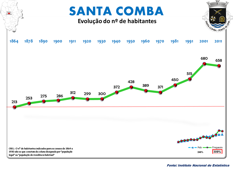 Censos 1864/2011